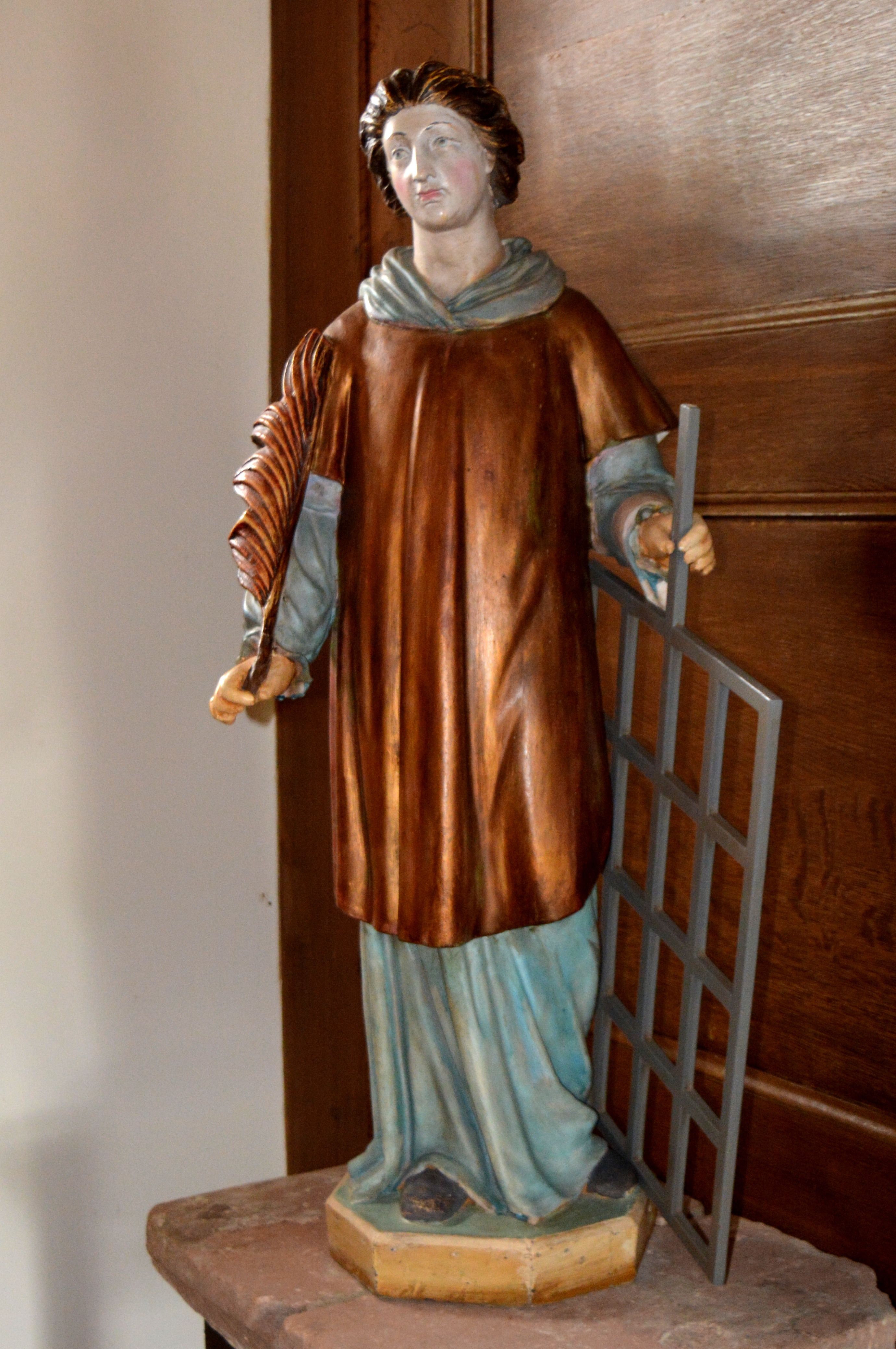 Laurentiuskerk, Raerd, beeld Sint Laurentius